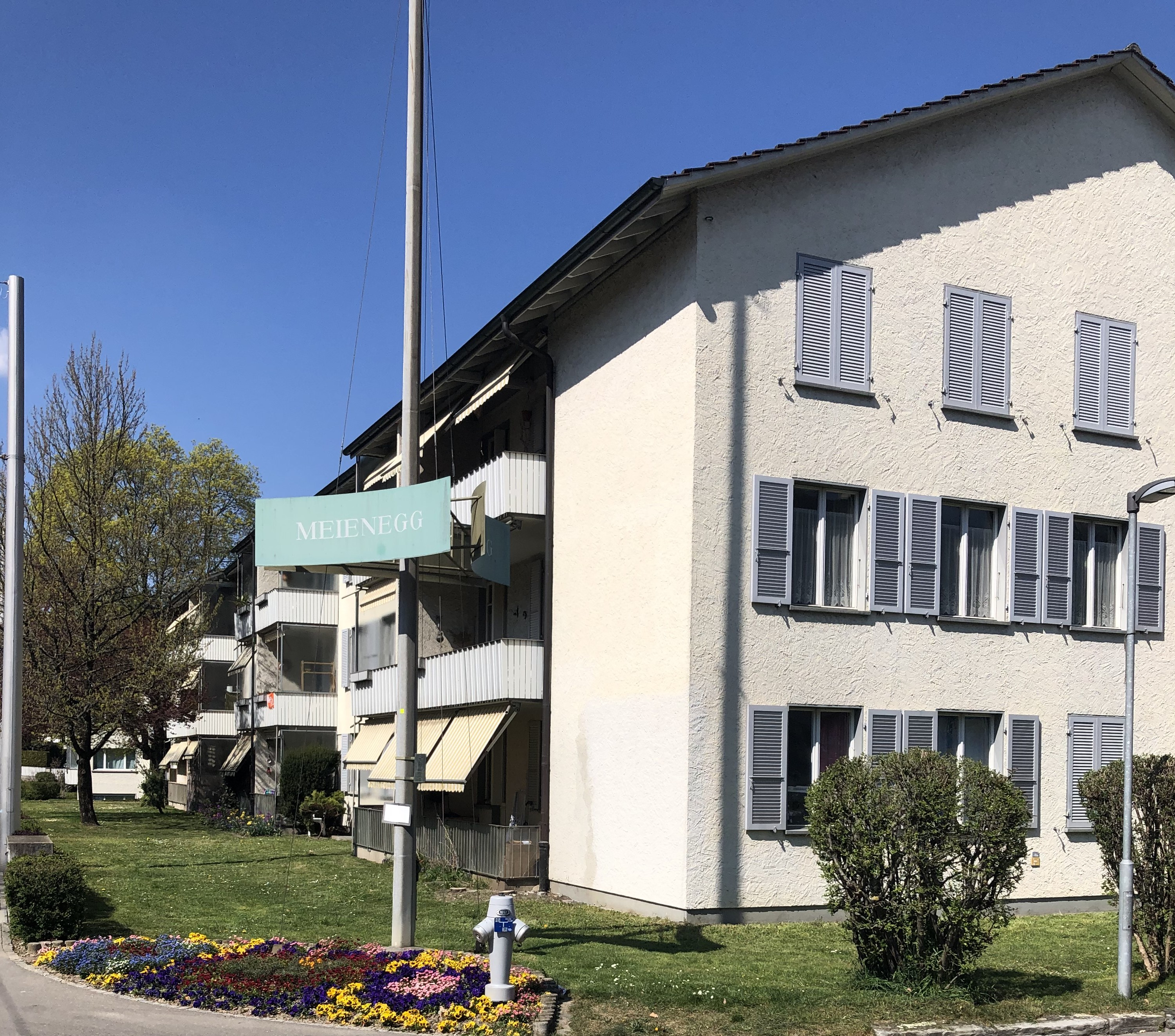 Stöckacker Siedlung Meienegg